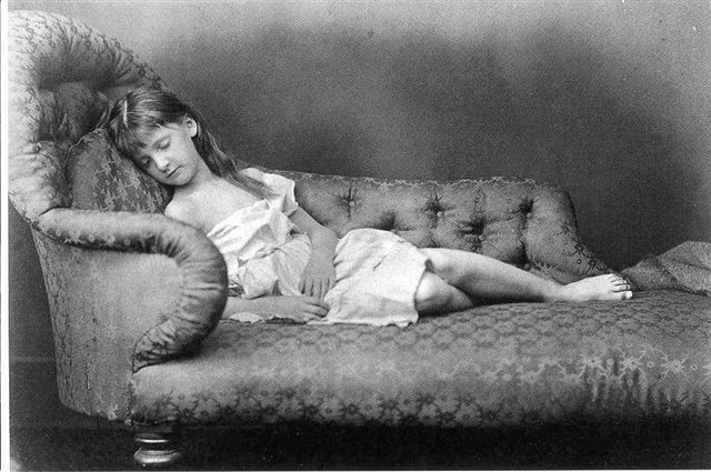 Alexandra "Xie" Kitchin fotografata nel 1873